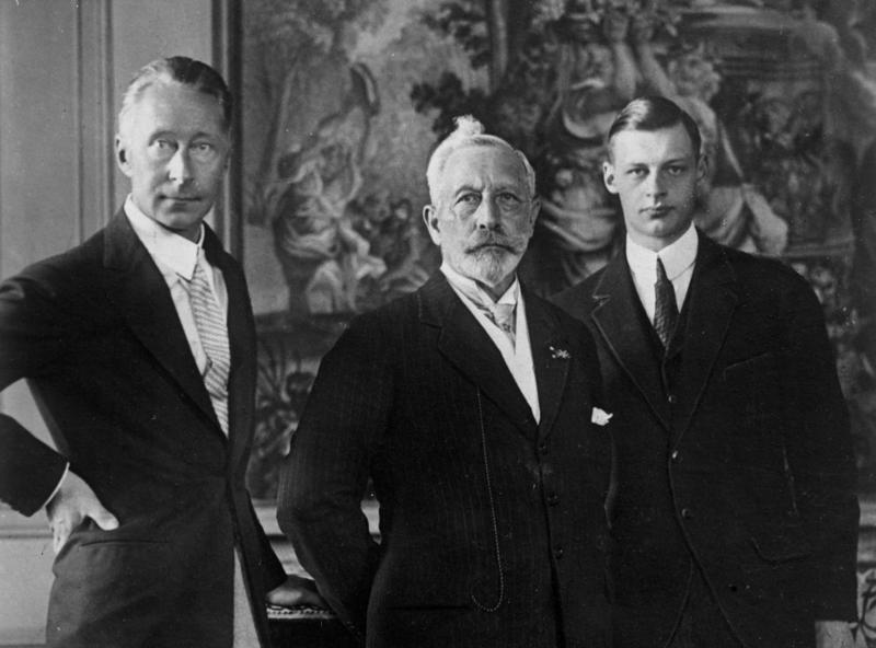 von links nach rechts: Kronprinz Wilhelm, Kaiser Wilhelm II. Prinz Wilhelm ("From left to right, Crown Prince Wilhelm, Kaiser Wilhelm II, Prince Wilhelm")